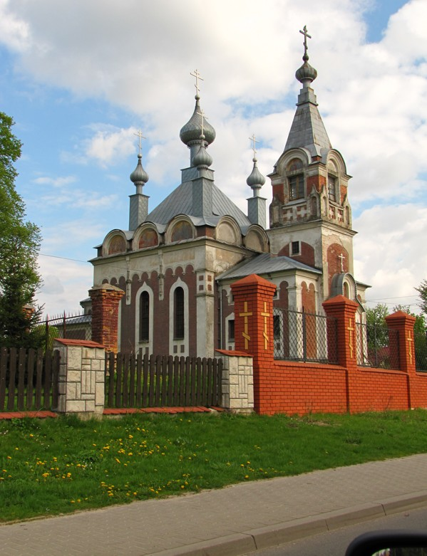 Cerkiew prawosławna fil. p.w. Wniebowzięcia NMP ob. p.w. Opieki Matki Boskiej (XIX/XX) w Sławatyczach